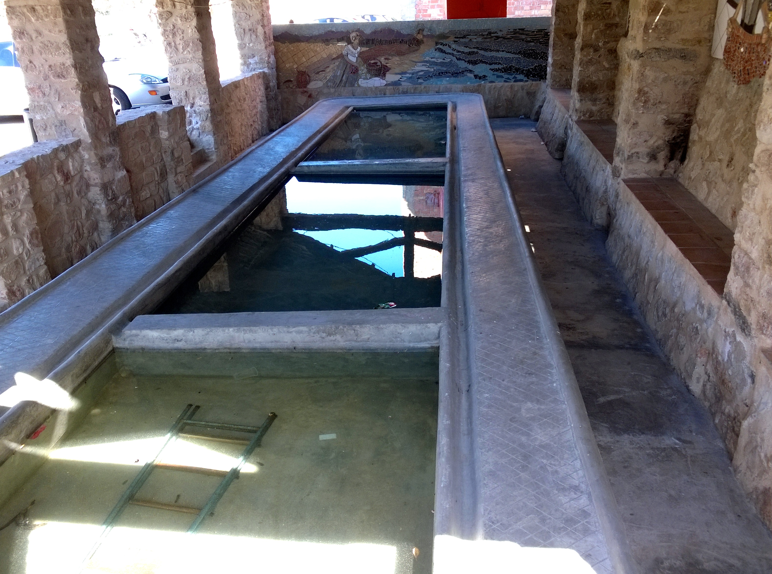 Safarejos públics de Benifallet (Baix Ebre)